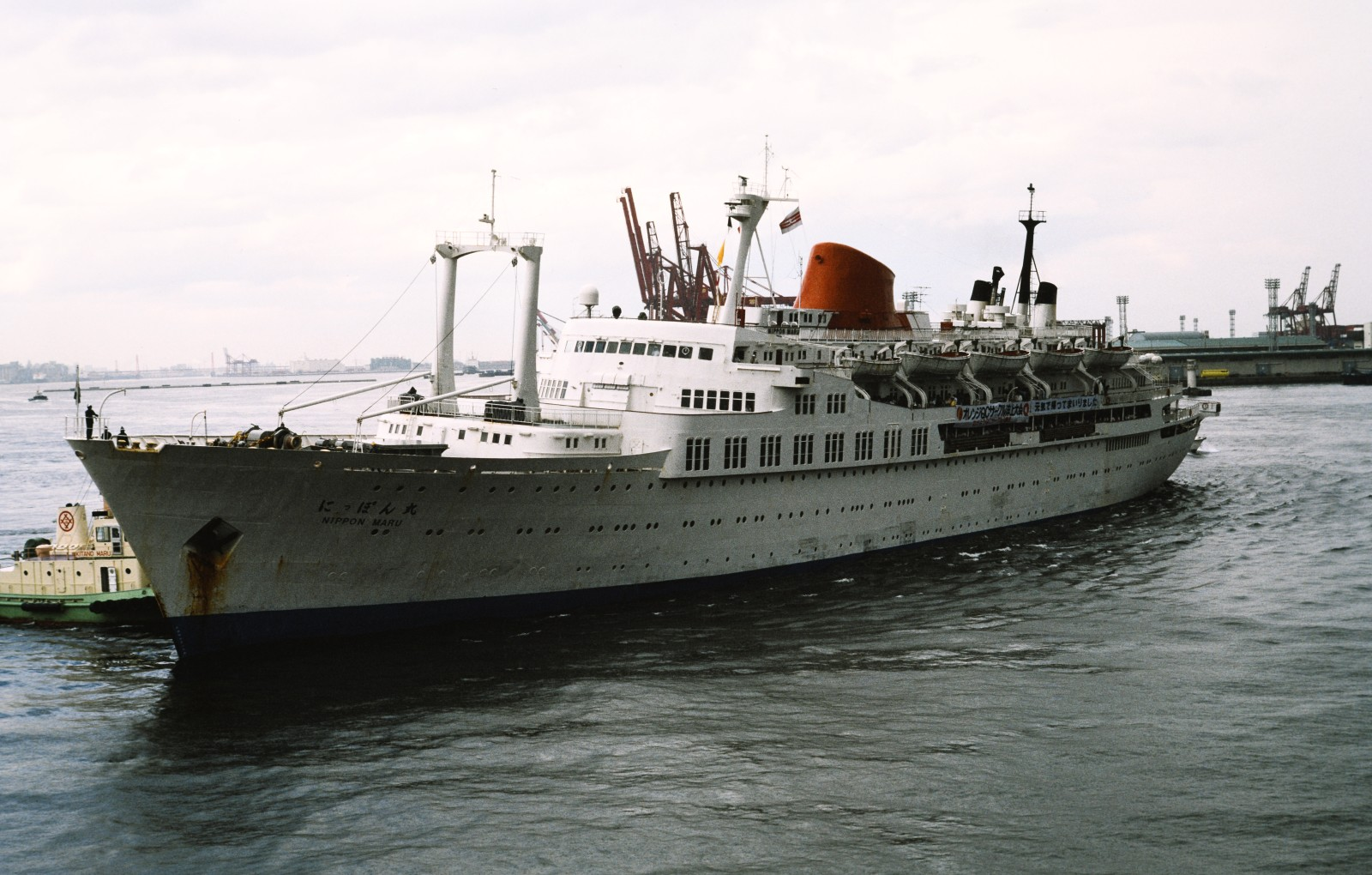 神戸港第四突堤に着岸する商船三井客船のクルーズ客船・にっぽん丸(二代目)